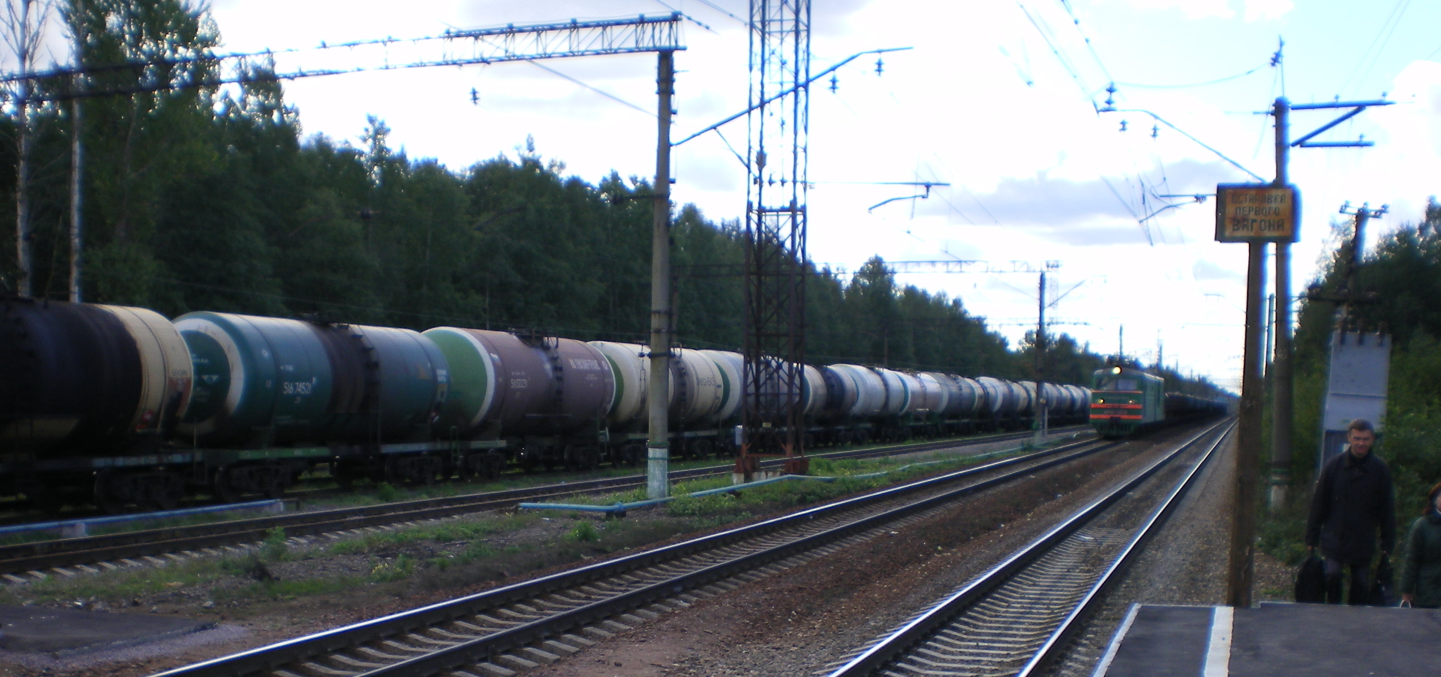 Платформа: остановка первого вагона. На встречном пути электровоз ВЛ-10